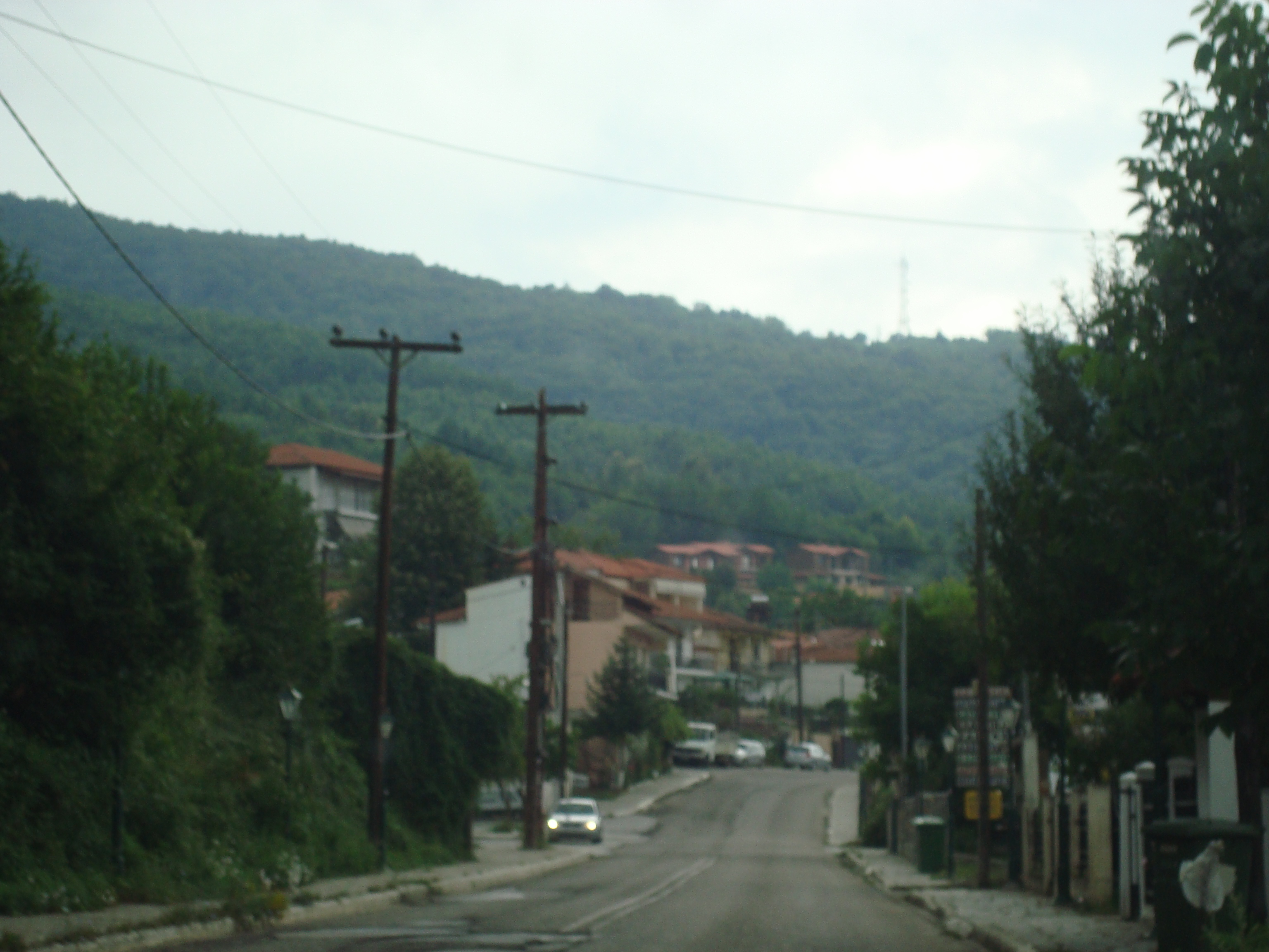 Неохори (Ново село), Ном Халкидики, Гърция.